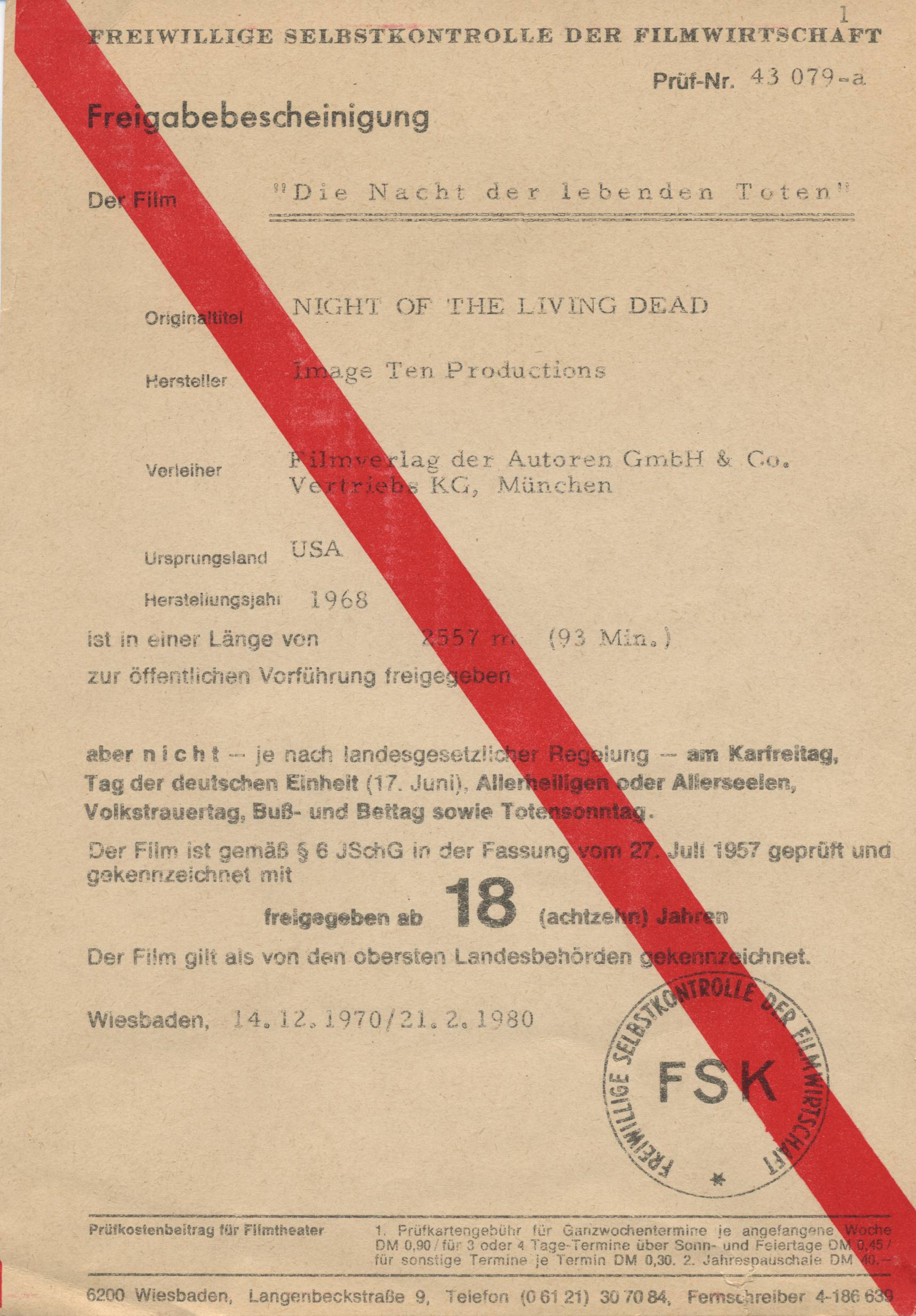 FSK-Karte